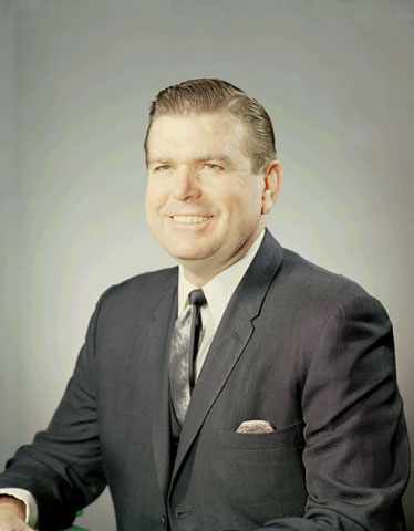 W. Marvin Watson chef de cabinet de la Maison Blanche